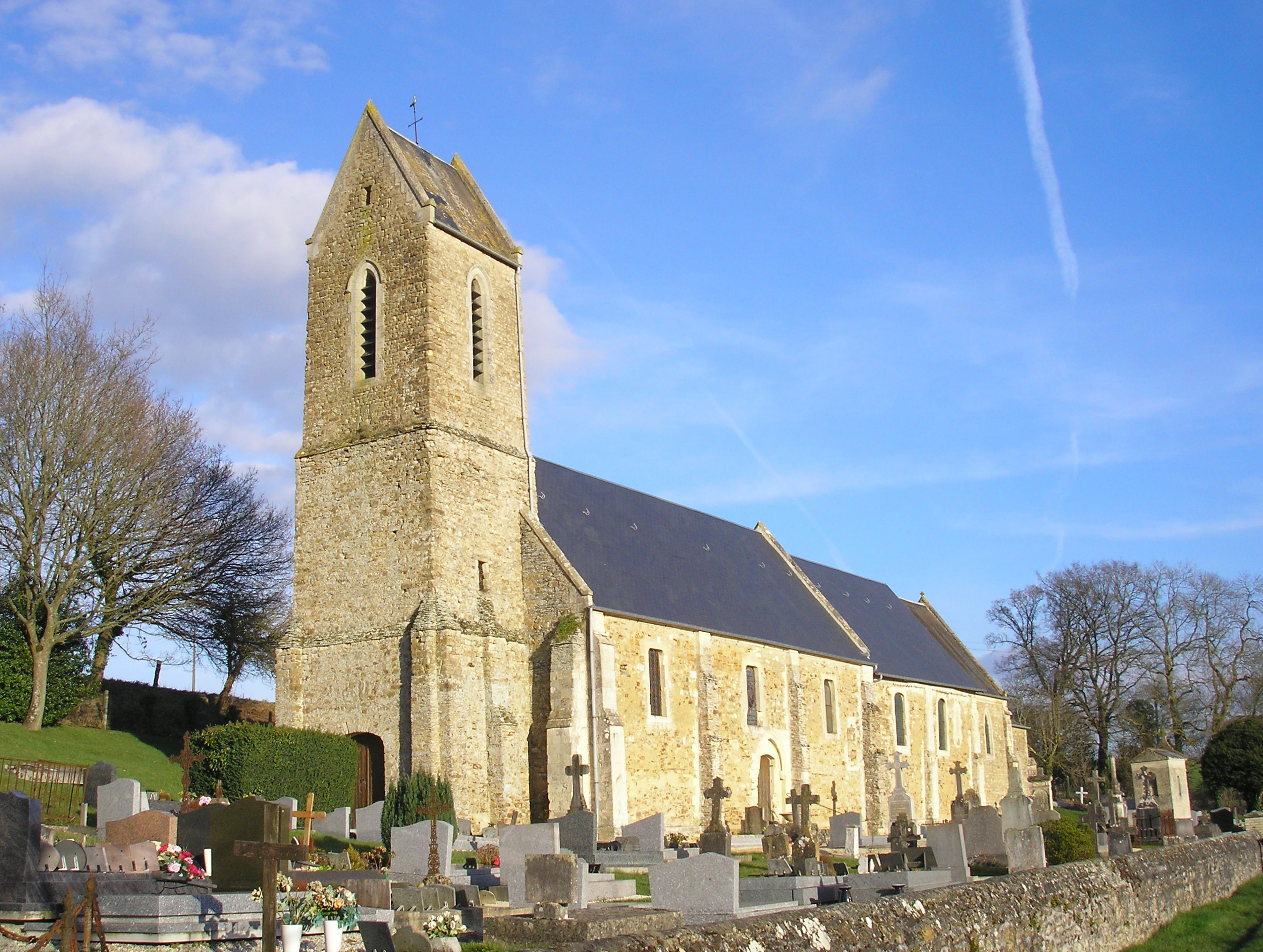 Tournay-sur-Odon (Normandie, France). L'église Saint-Pierre.